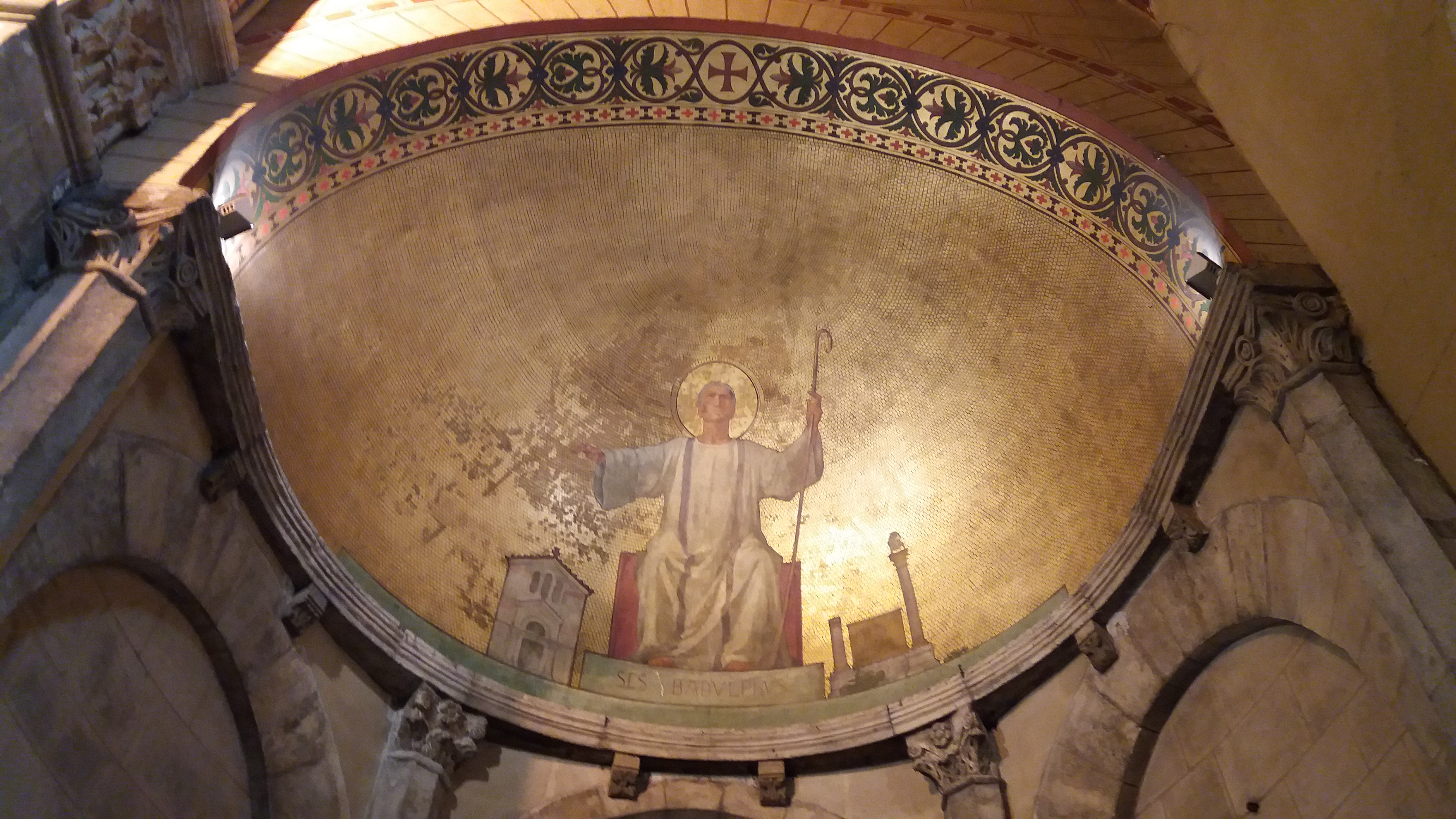 Absidiole de Saint Radulphe.